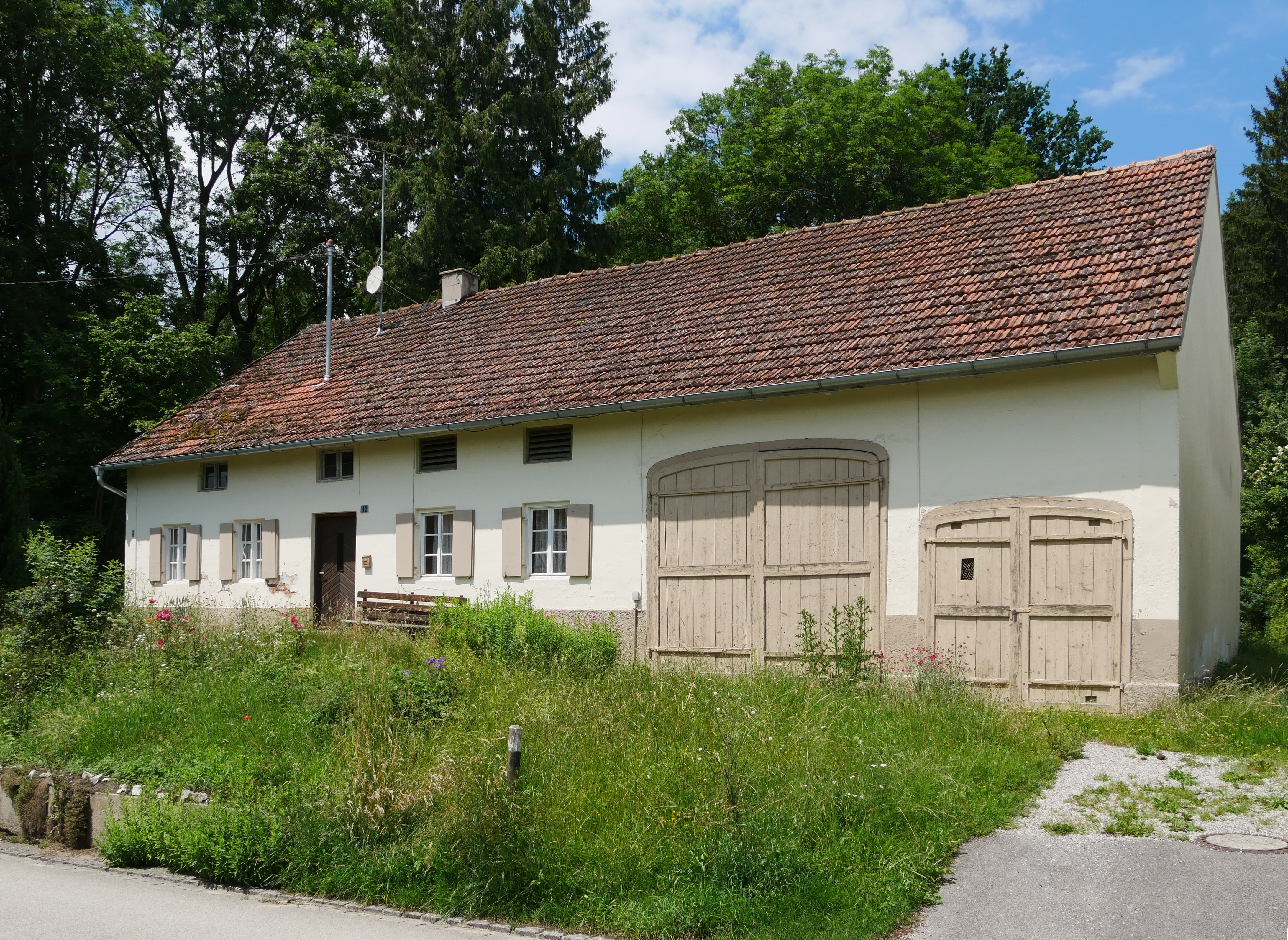 Mammendorf, Ortsteil Nannhofen, Dorfstr. 12: Ehemaliger Einfirsthof aus der zweiten Hälfte des 19. Jhdts